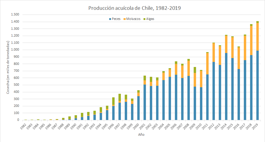 Producción de la acuicultura de Chile: cosecha total por año y por grupo de especies, 1982-2019. Fuente: Anuarios estadísticos del Servicio Nacional de Pesca y Acuicultura de Chile.